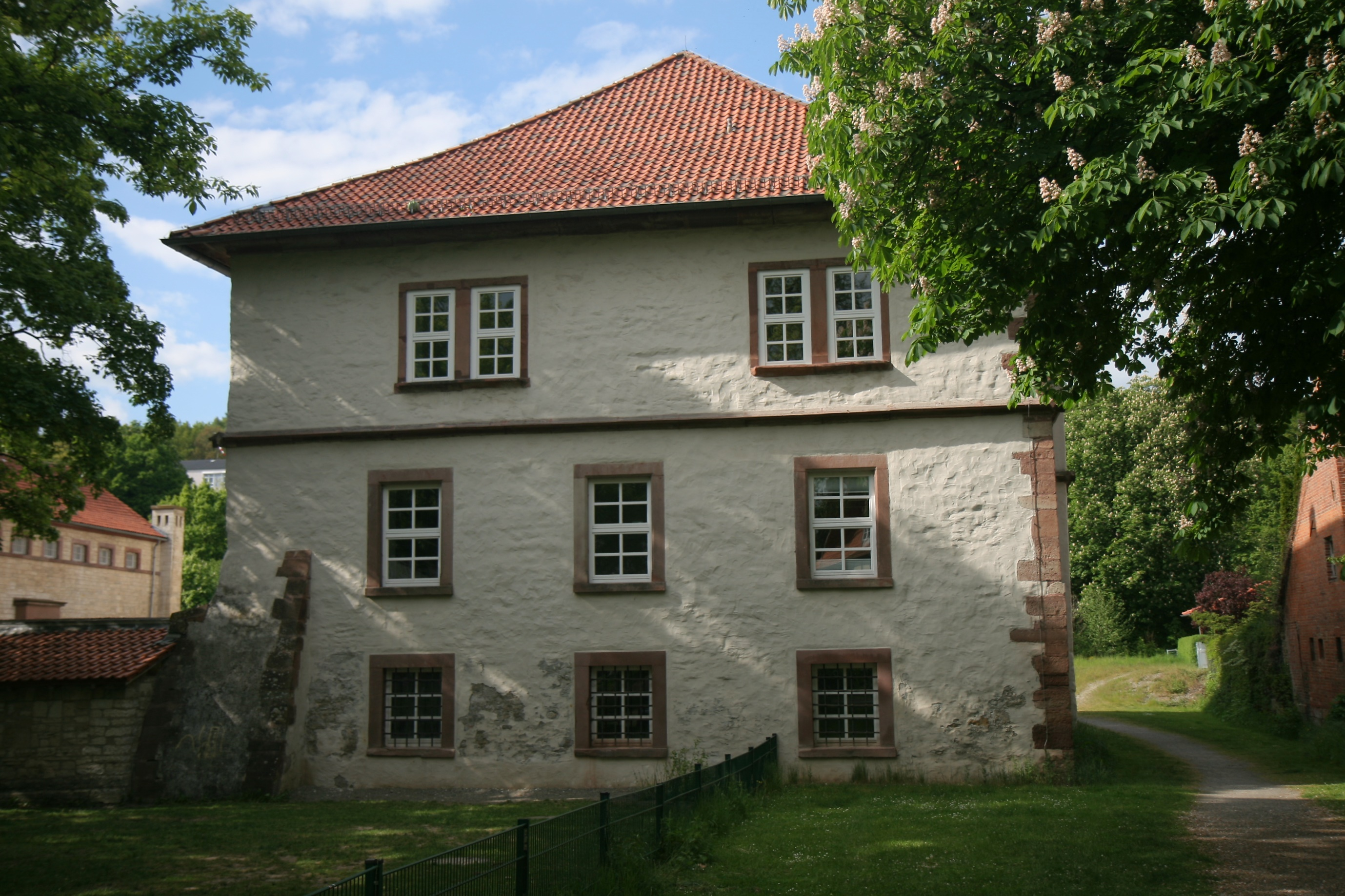 Gebäude des Amtsgerichts Bad Gandersheim, Herrenhaus der Burg, Am Plan 3 b in Bad Gandersheim.